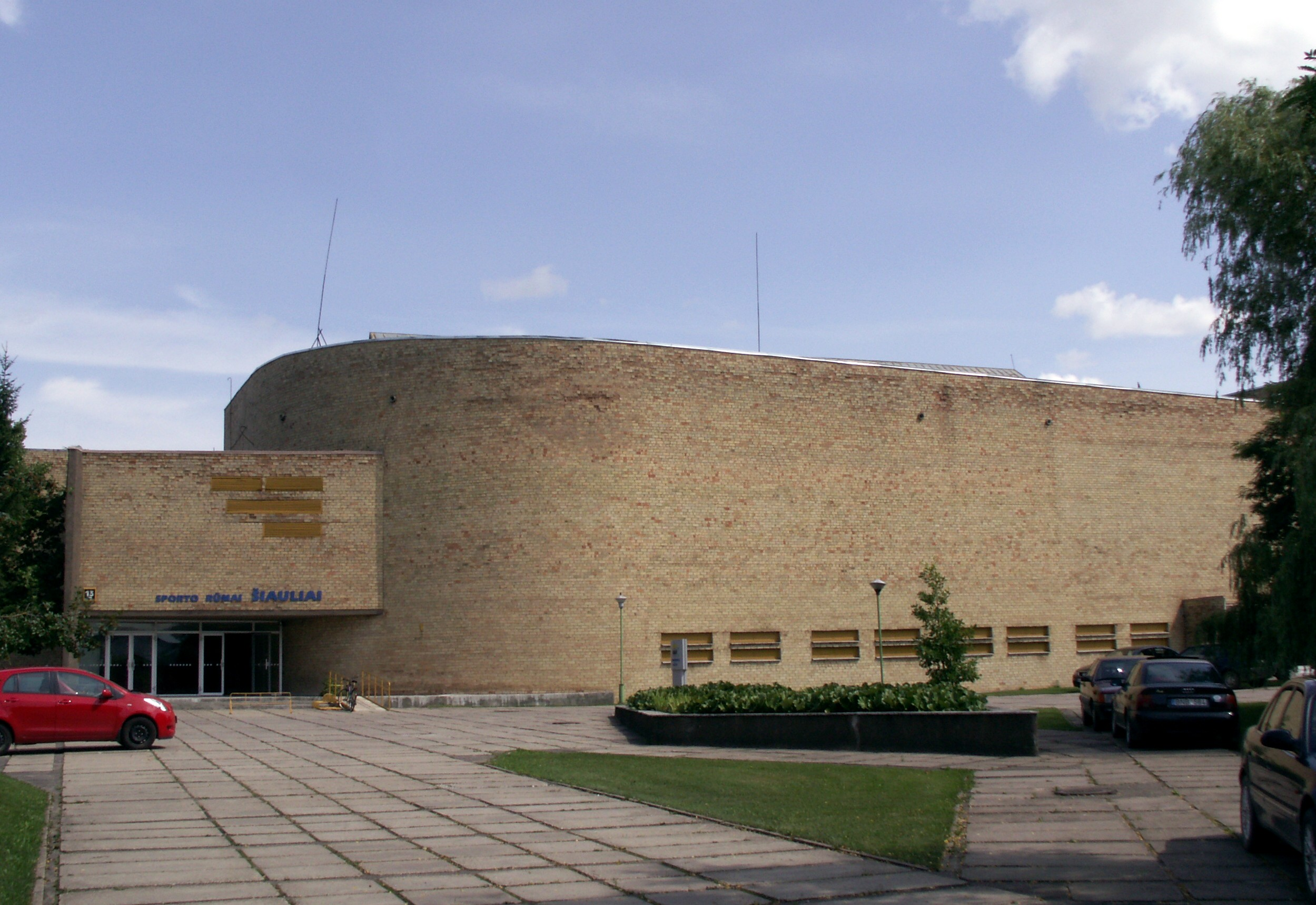 Šiaulių sporto rūmai